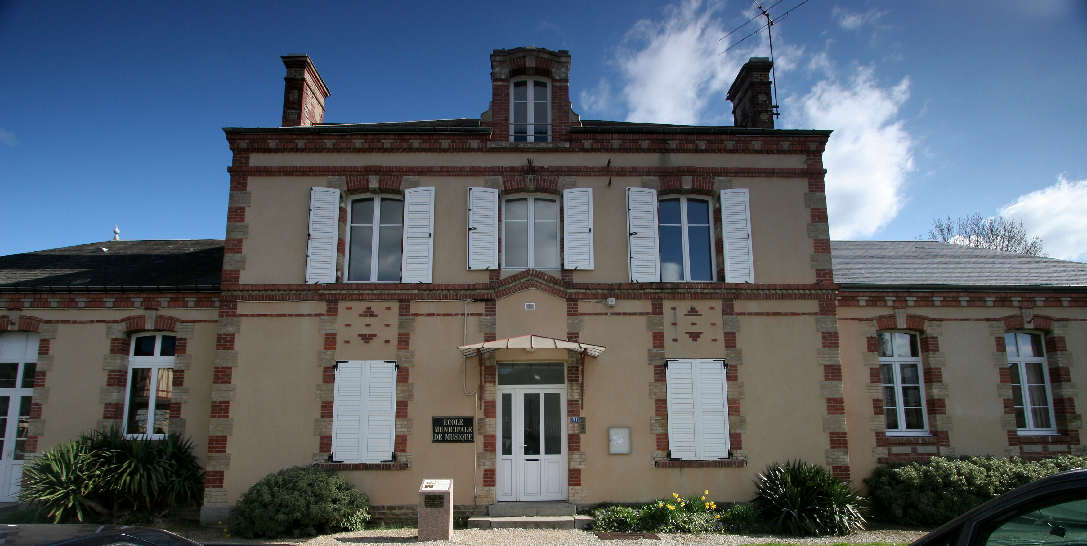 Ancienne école et mairie de Potigny (maintenant école de musique), Potigny, Calvados, France